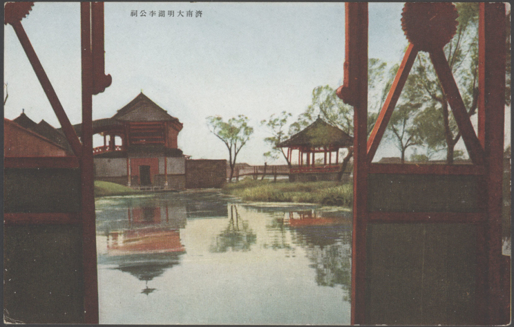 济南大明湖李公祠北端紧邻大明湖的飞龙楼与湖中的觉沤亭